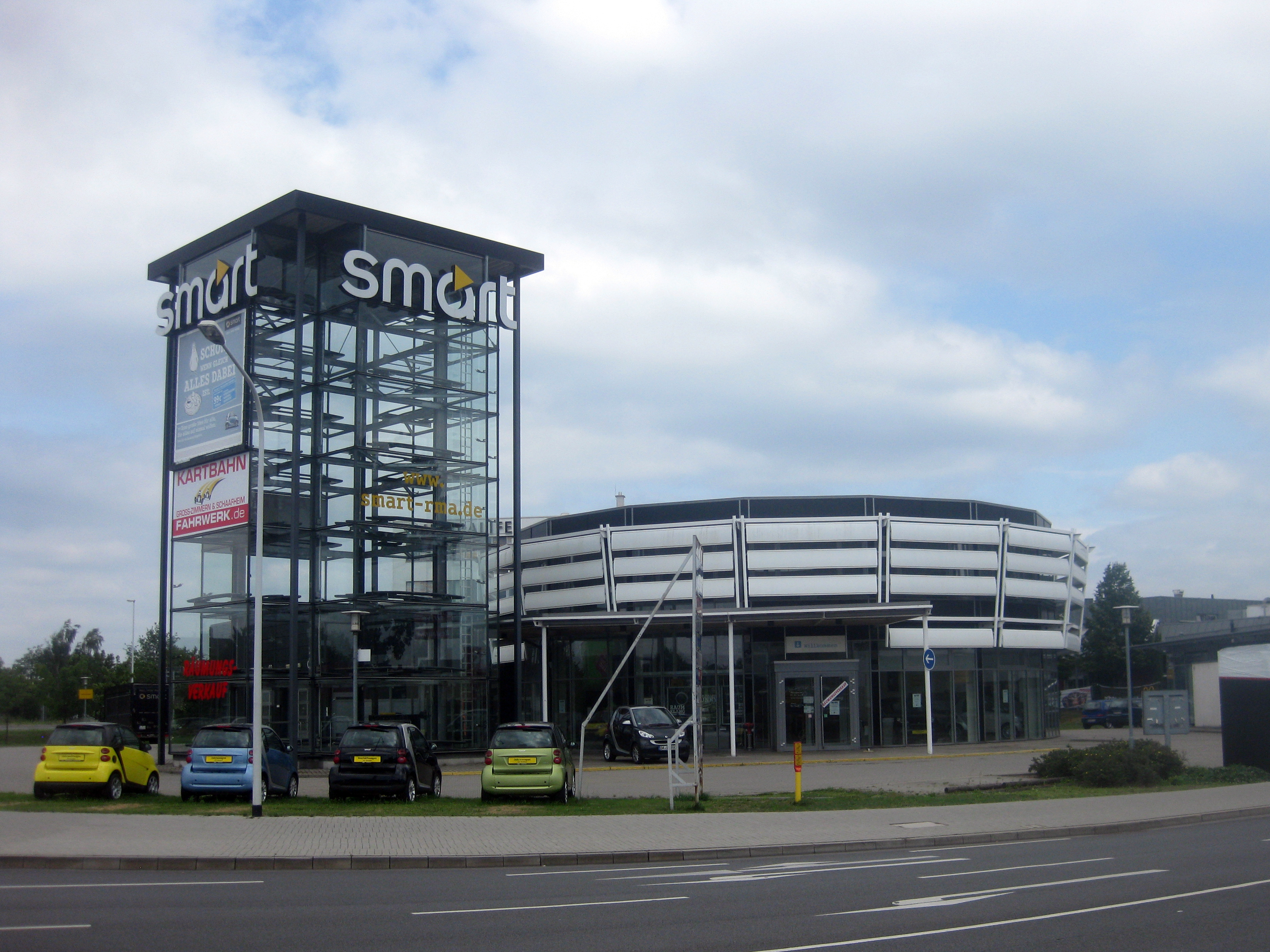 Smart Center Darmstadt (2012 abgerissen), als Beispiel für Corporate Architecture. Architekt: Ralph Küster